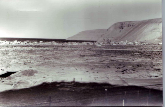 Rada Tilly en sus primeros años desde el hipódromo